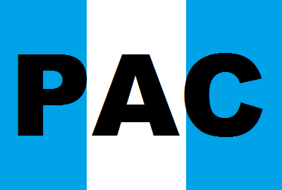 Bandera de las Patrullas de Autodefensa Civil